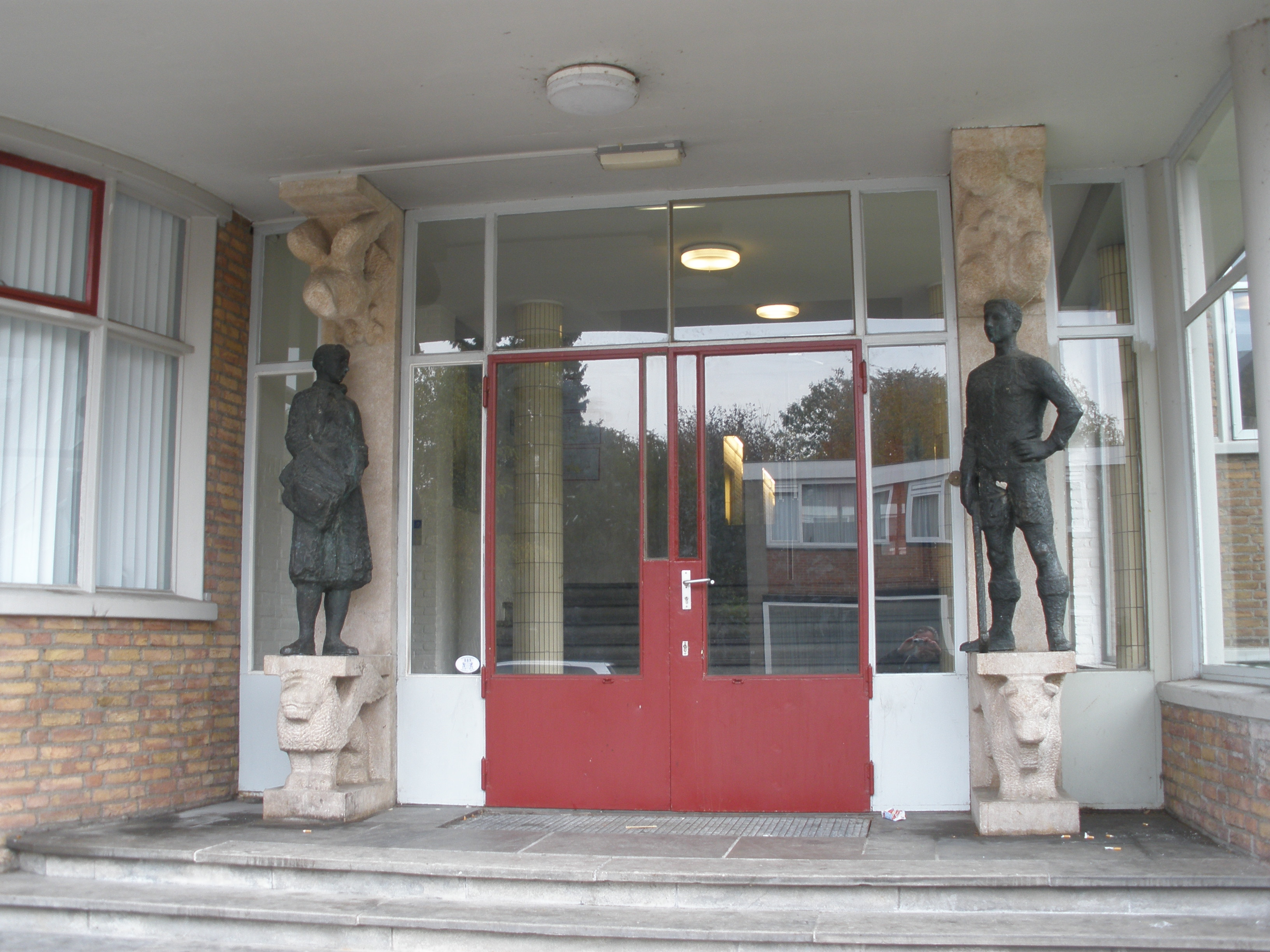 sculptuur Pieter d'Hont